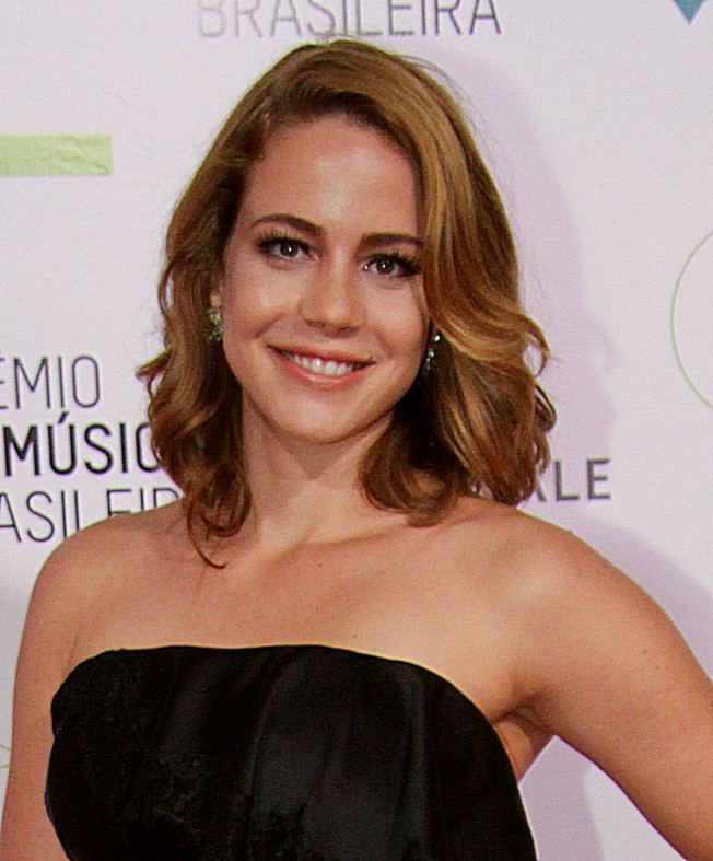 Leandra Leal - 26° Prêmio da Música Brasileira 2015, no Theatro Municipal, no Centro do Rio de Janeiro/RJ. (10/06/15) Foto: Roberto Valverde/Divulgacão